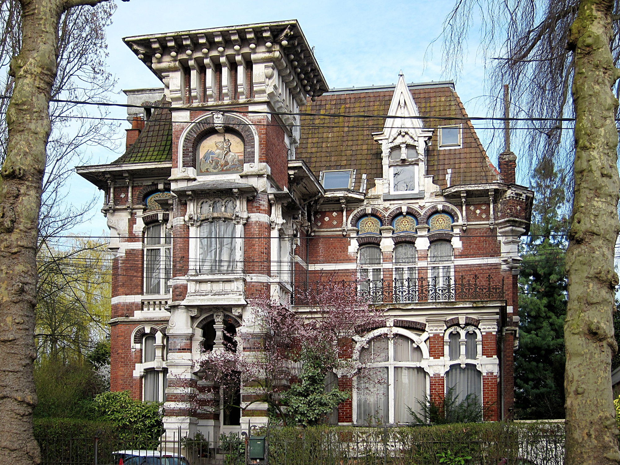 La villa Saint-Georges à Lambersart (Nord).